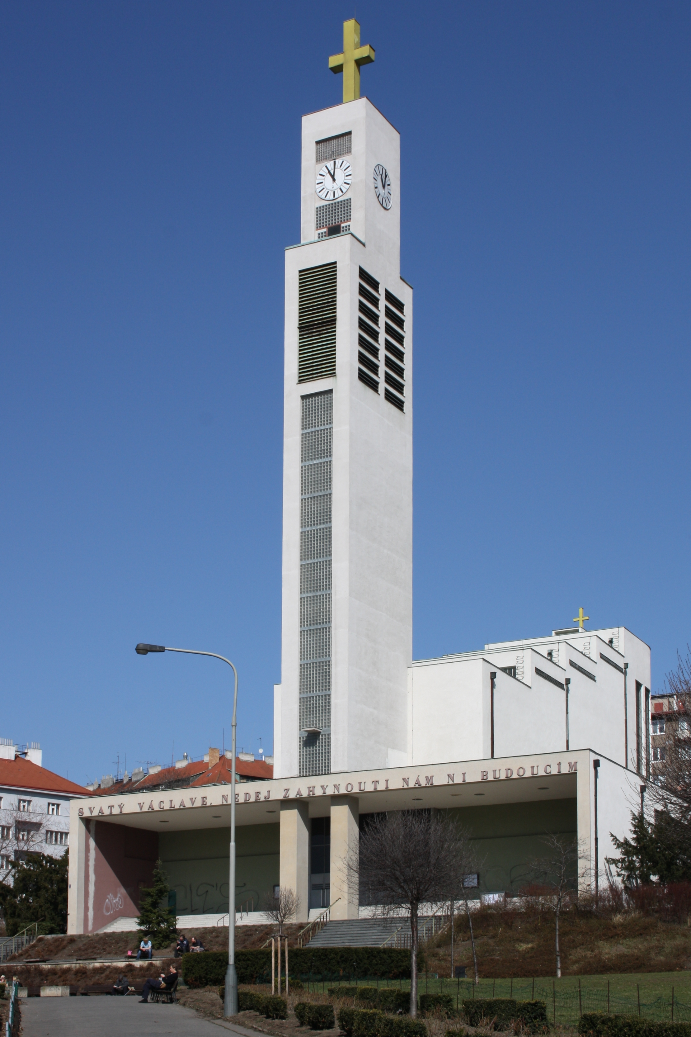 Praha, Vršovice - kostel svatého Václava